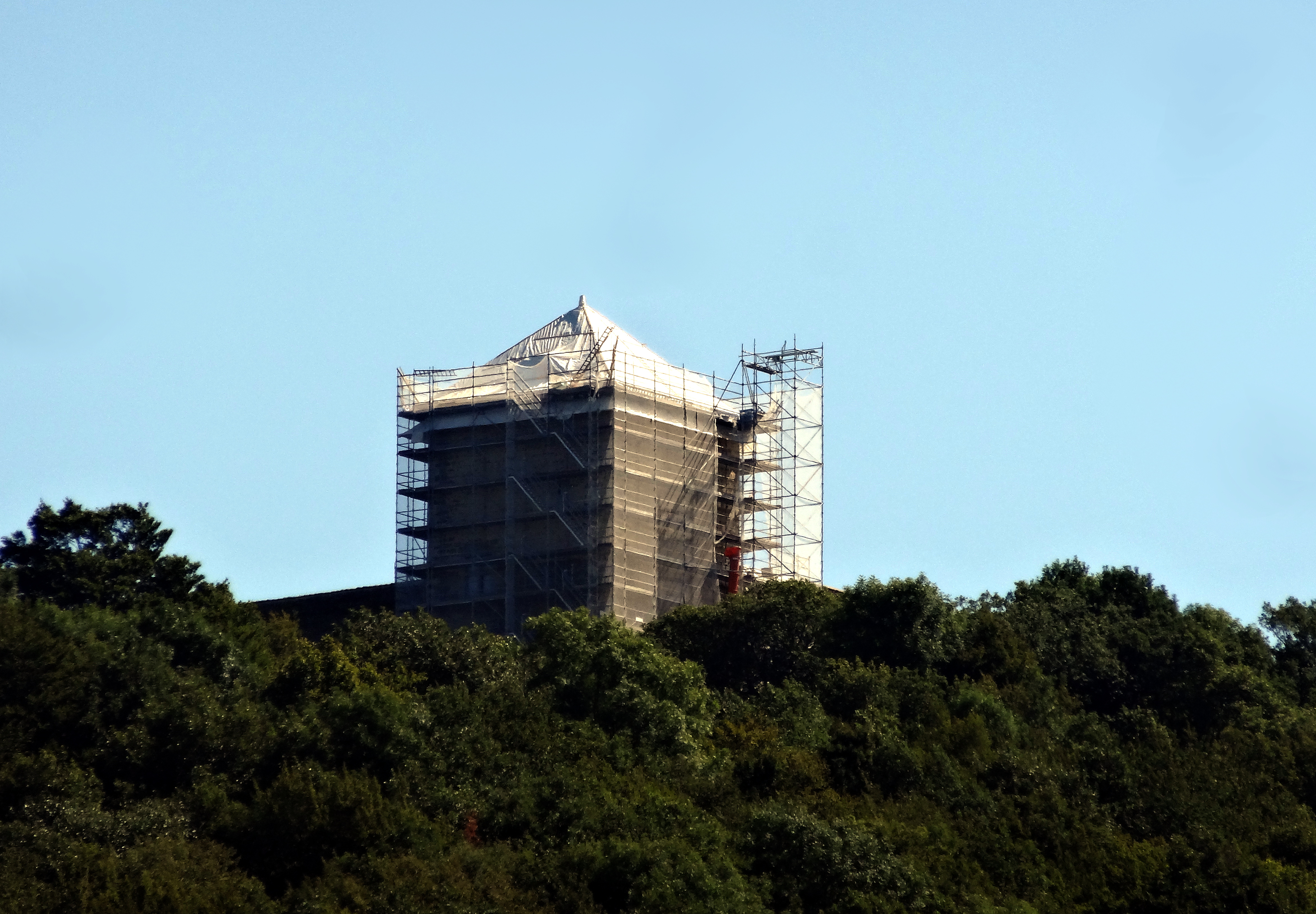 Travaux de rénovation, château des Allymes